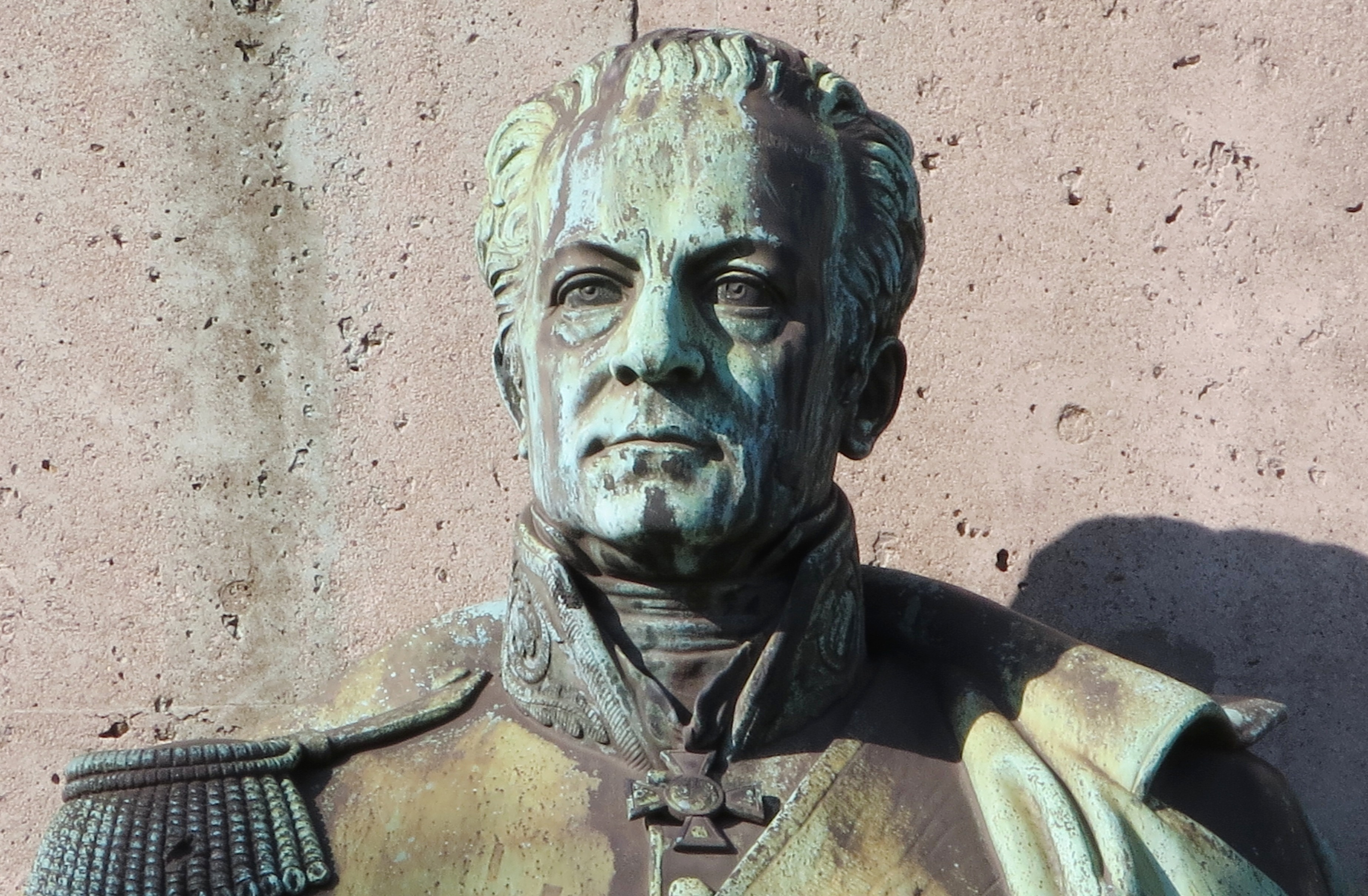 Der preußische Staatskanzler Hardenberg am Denkmal für Friedrich Wilhelm III. auf dem Heumarkt in Köln